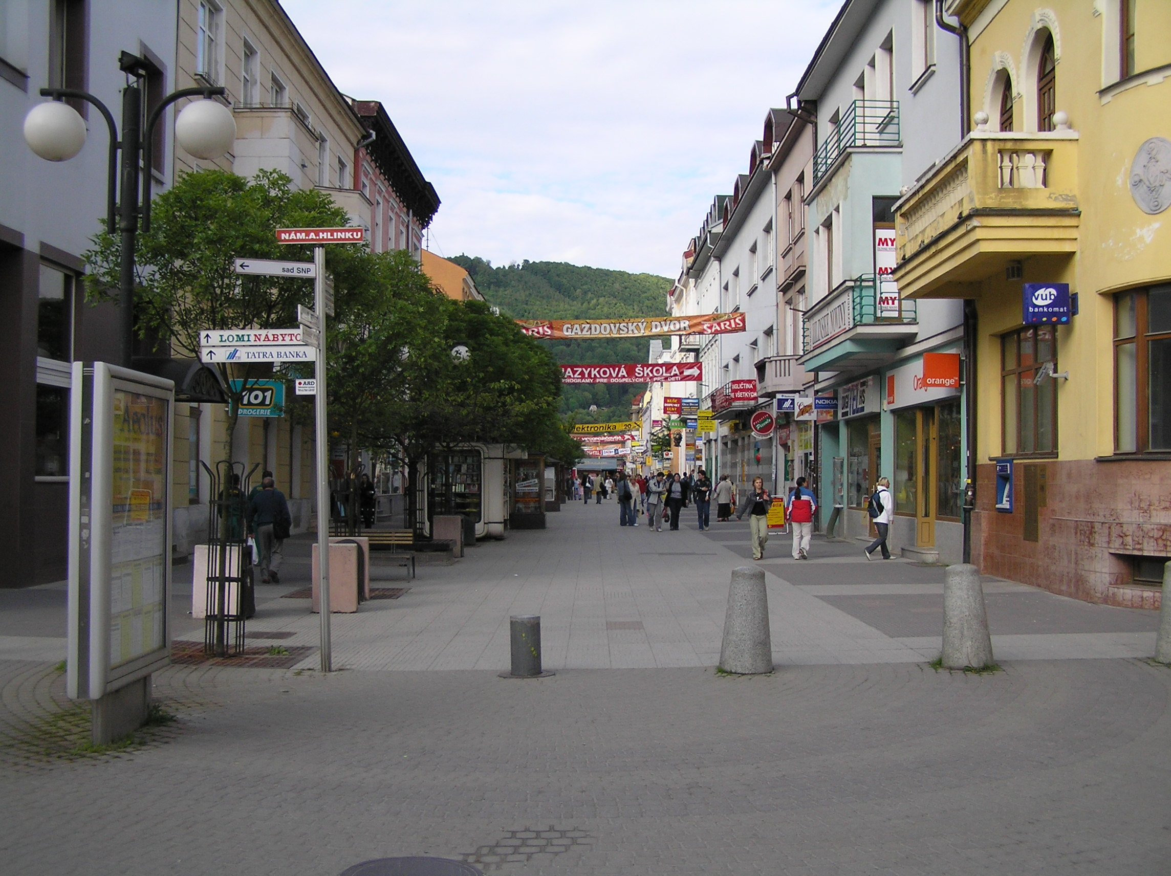 Žilina, Námestie A. Hlinku, ulica Národná (býv. Masarykova)